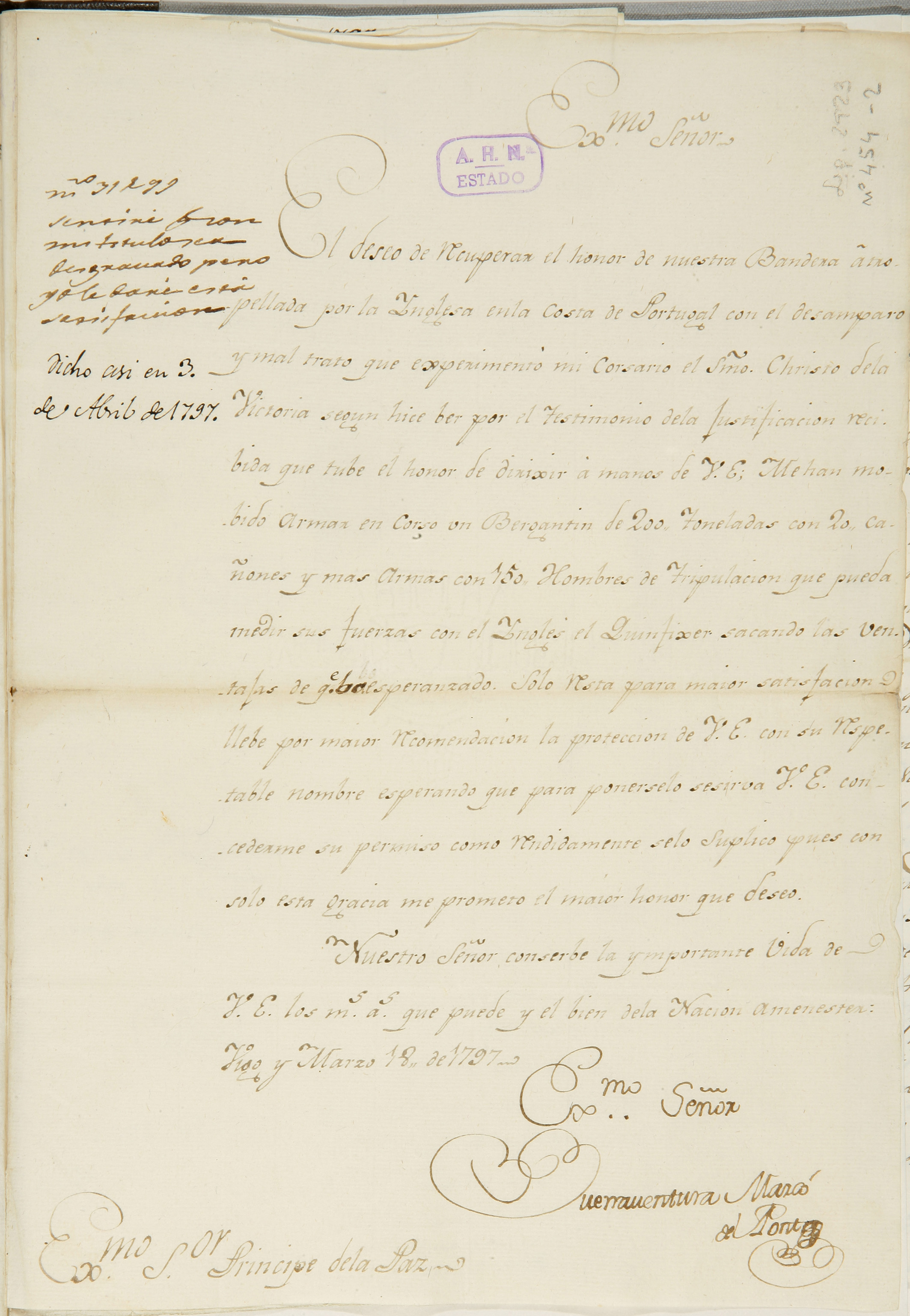 Exmo. Señor. El deseo de recuperar el honor de nuestra Bandera atropellada por la Inglesa en la costa de Portugal con el desamparo y mal trato que experimentó mi Corsario el Smo. Christo de la Victoria, según hice ber por el testimonio de la justificación recibida que tube el honor de dirixir a manos de V.E ; Me han mobido armar en Corso un Bergantín de 200 toneladas con 20 cañones y mas armas con 150 Hombres de Tripulación que pueda medir sus fuerzas con el Inglés el Quinfixer (Queen Fixer ?, un barco) sacando las ventajas del que ba esperanzado. Solo resta para maior satisfación lleve por maior recomendacion la protecion de V.E con su respetable nombre esperando que para ponerselo se sirva V.E concederme su permiso como rendidamente sello suplico pues con solo esta gracia me prometo el maior honor que deseo. Nuestro Señor conserbe la ymportante Vida de V.E los ms.(mismos) as (años)que puede y el bien dela Nacion amenester: Vigo y Marzo 18, de 1797. Exmo. Señor Buenaventura Marcó del Pont Exmo Señor Principe de la Paz.